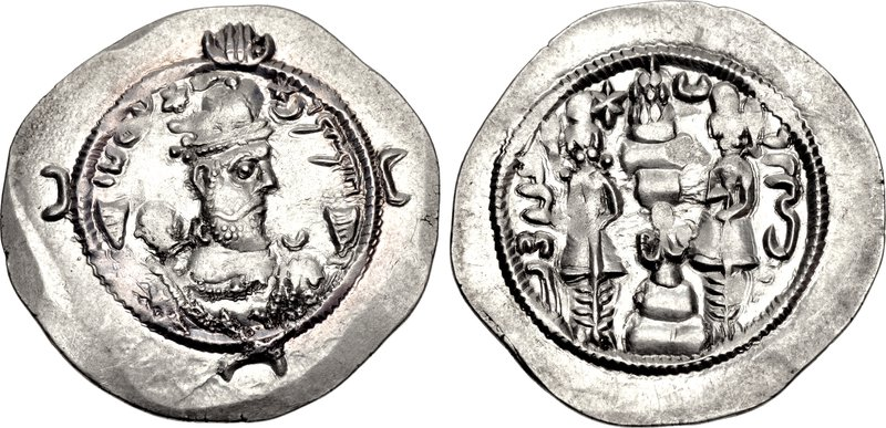 Moeda de Vararanes VI